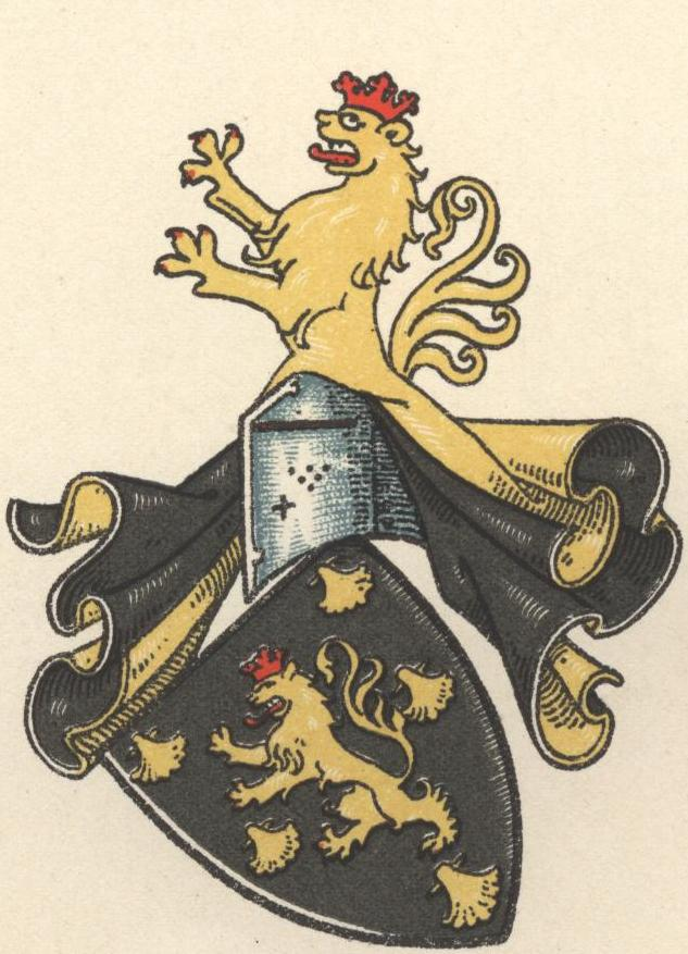 Wapen van de familie Spies von Büllesheim